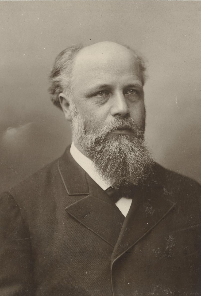 Portrait photographique d'Angelo Mariani (Atelier Nadar, 1900)